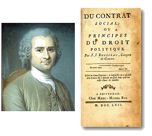 Jean-Jacques Rousseau autor del Contrato Social